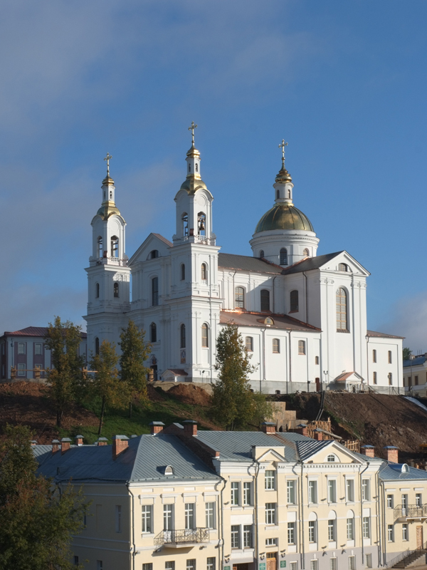 Беларуская (тарашкевіца): Комплекс былога базыліянскага манастыра: былы манастырскі корпус, будынак былога народнага вучылішча, Усьпенскі сабор This is a photo of Belarusian heritage monument. Reference number: 212Г000062 ( WLM)